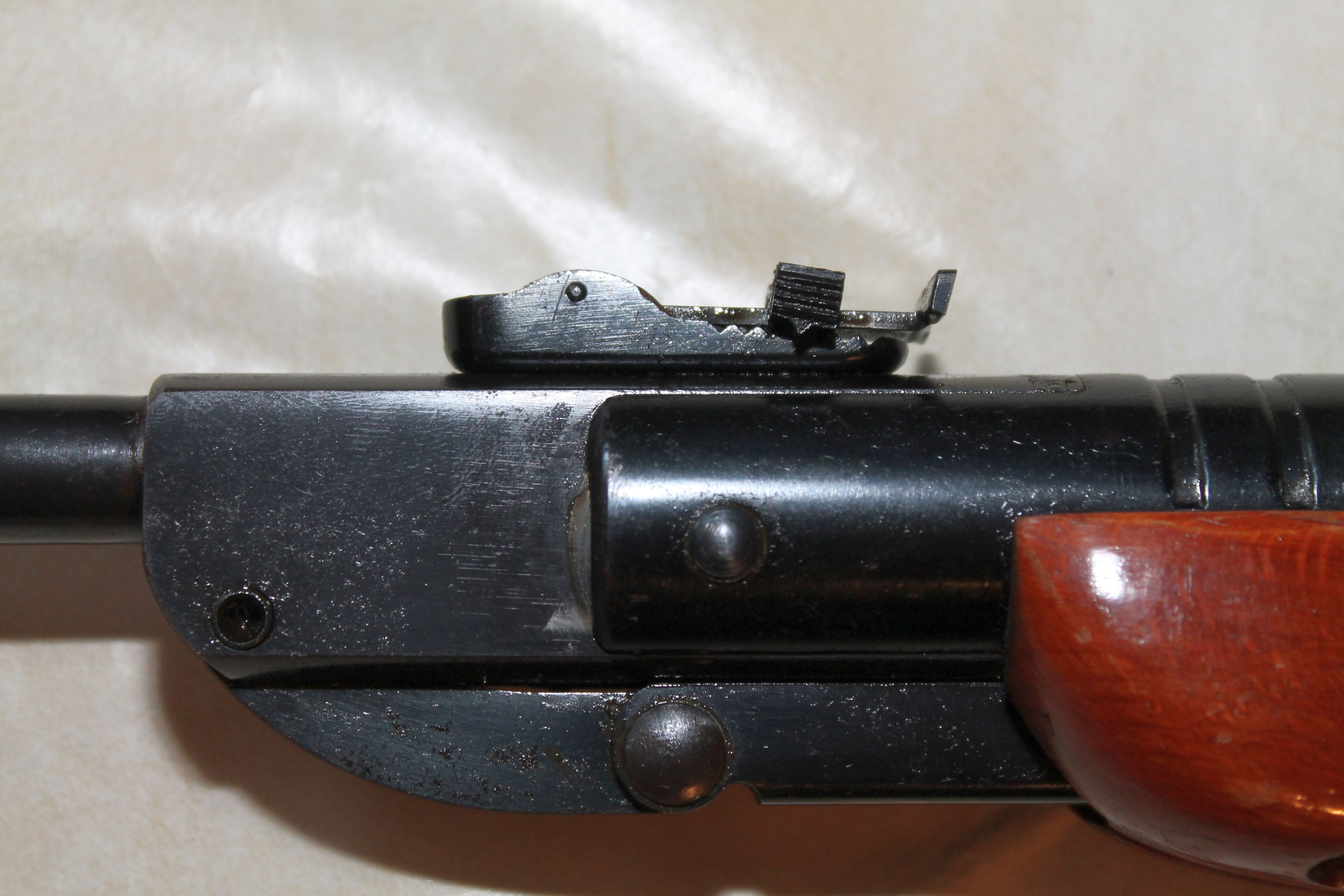 Haenel-Luftgewehr III-284 von 1962. Schieberastkimme.